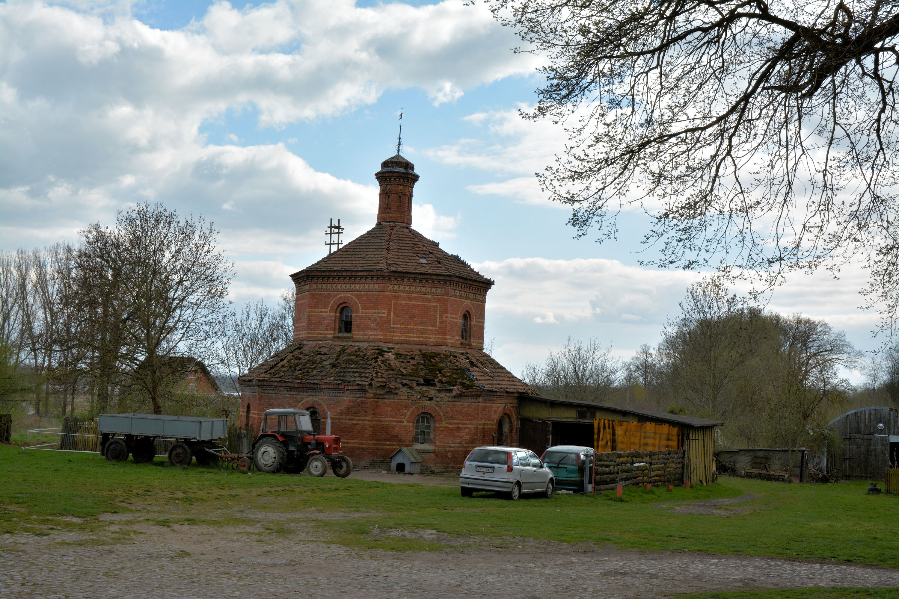 Lubiatowo - gołębnik (1902) w zespole pałacowym 11.1991.